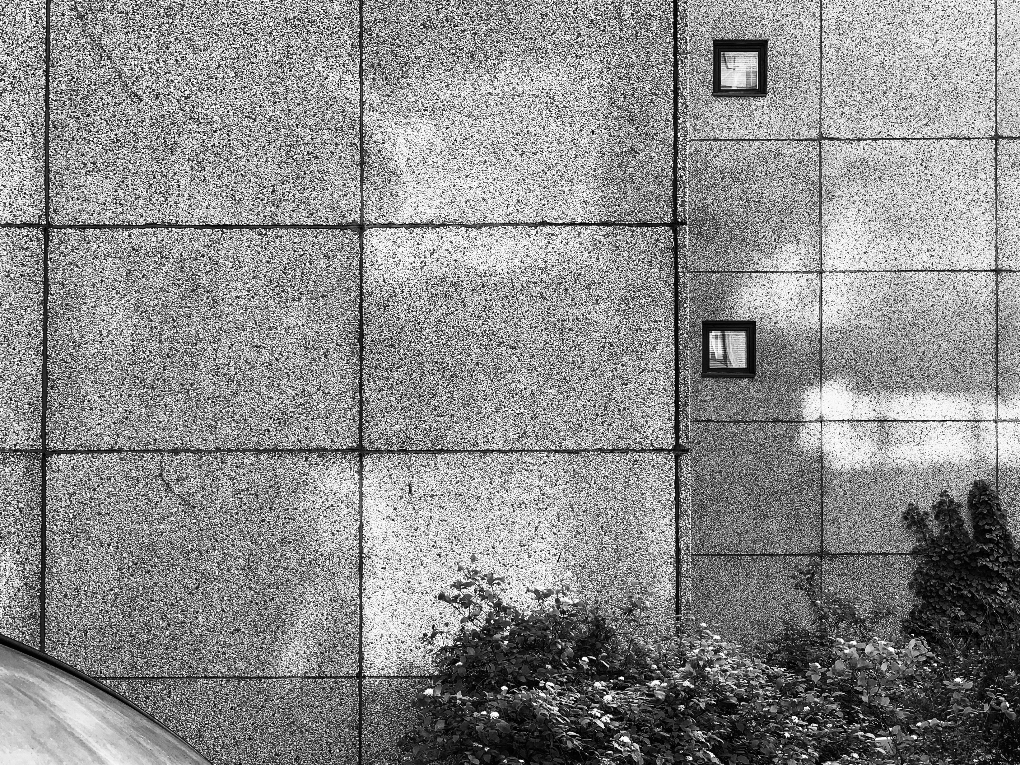 Asemapäällikönhovin toimistorakennus kuvattuna pihakannelta, asuinrakennuksen alta. Kuvattu kesällä 2019.